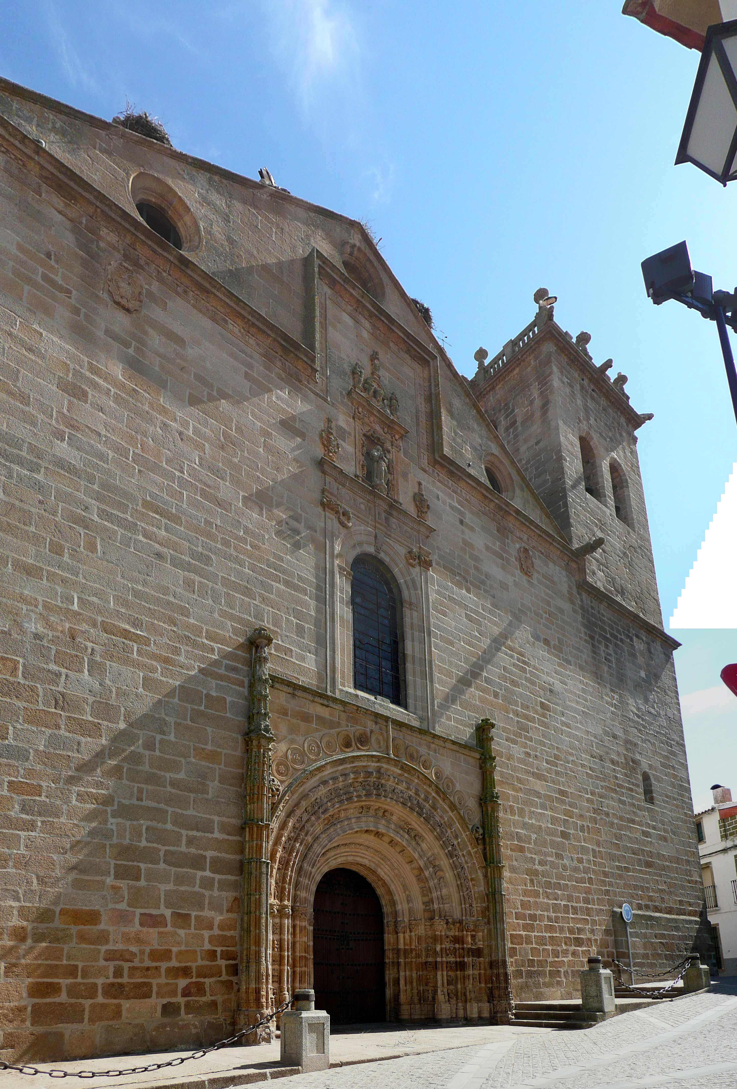 Nuestra Señora de la Asunción